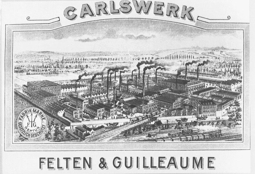 Ansicht des Carlswerks, eine Betriebsstätte von Felten & Guilleaume